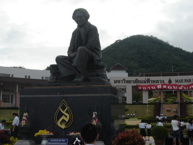 Mae Fah Luang university, Chiangrai, Thailand